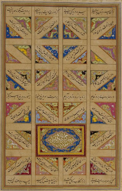 1539-1543 Xəmsə Əlyazmasında Mahmud Şah Nişapurinin xətti, Leyli və Məcnun poeması